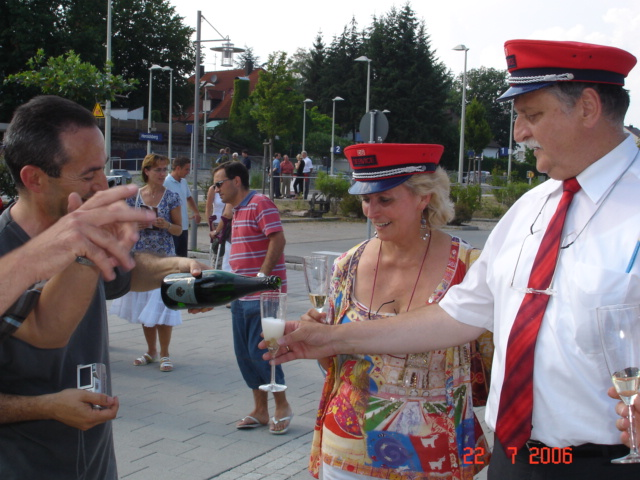 Triebwagen der Baureihe 642 im Bahnhof Heroldsberg. Musikalische Luftblasen mit Percussion Gruppe Percujove und spanische champagner Castell dels Sorells.